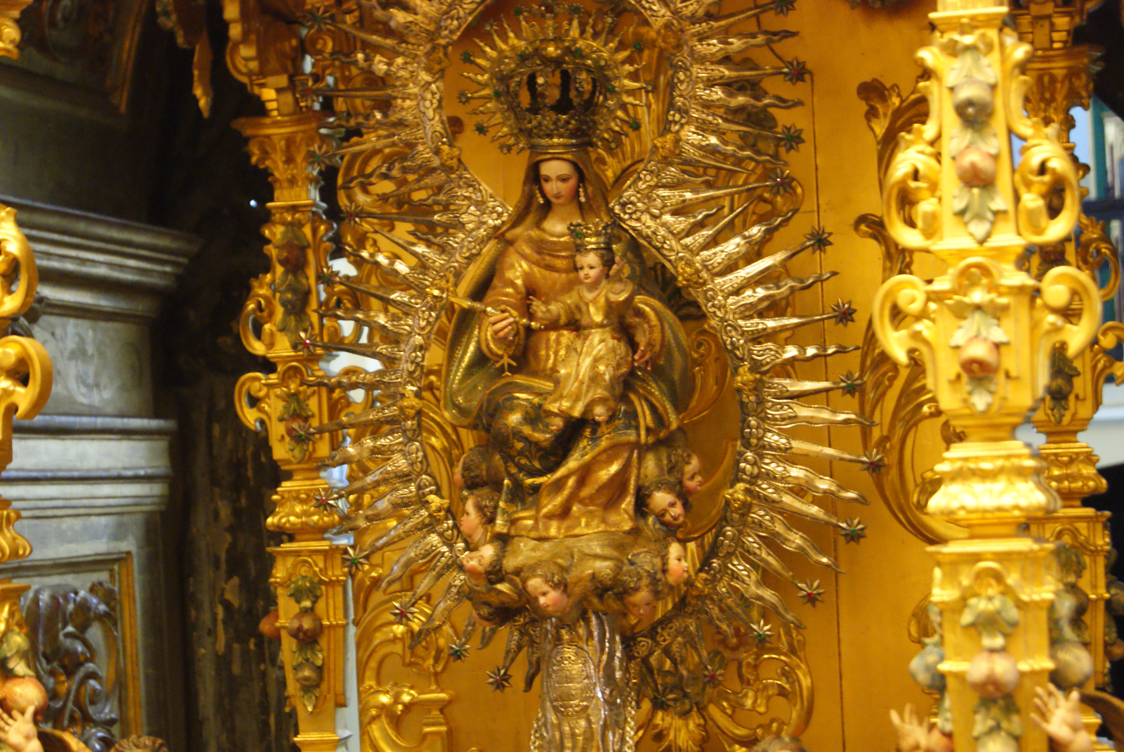 Imagen gloriosa de la Virgen de Loreto. Monasterio franciscano ubicado en Espartinas (Sevilla-España)